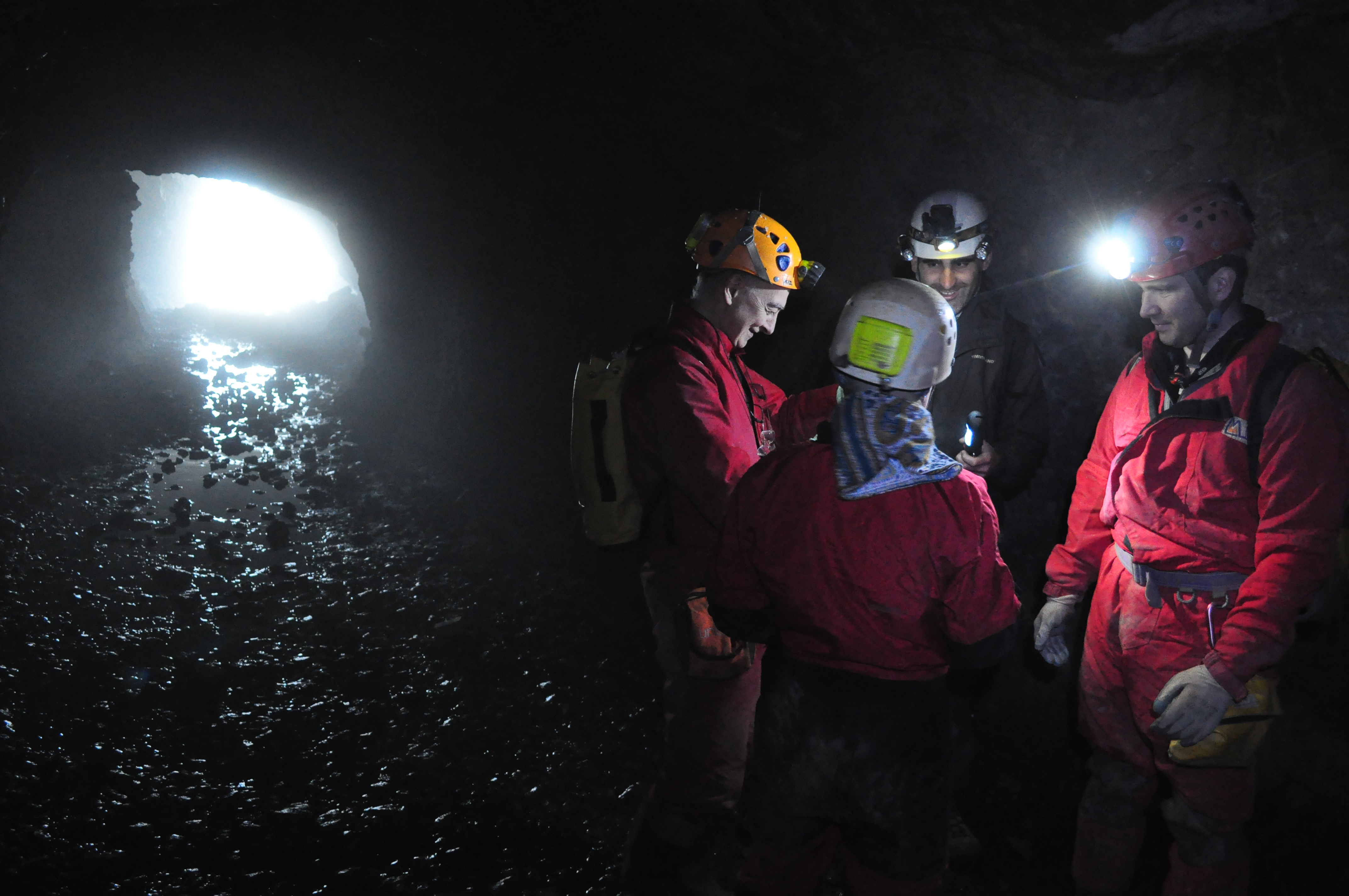 Bioespeleologoak "Mina Dolores" meatzean (Urallaga Sistema, Trianoko mendiak, Galdames).